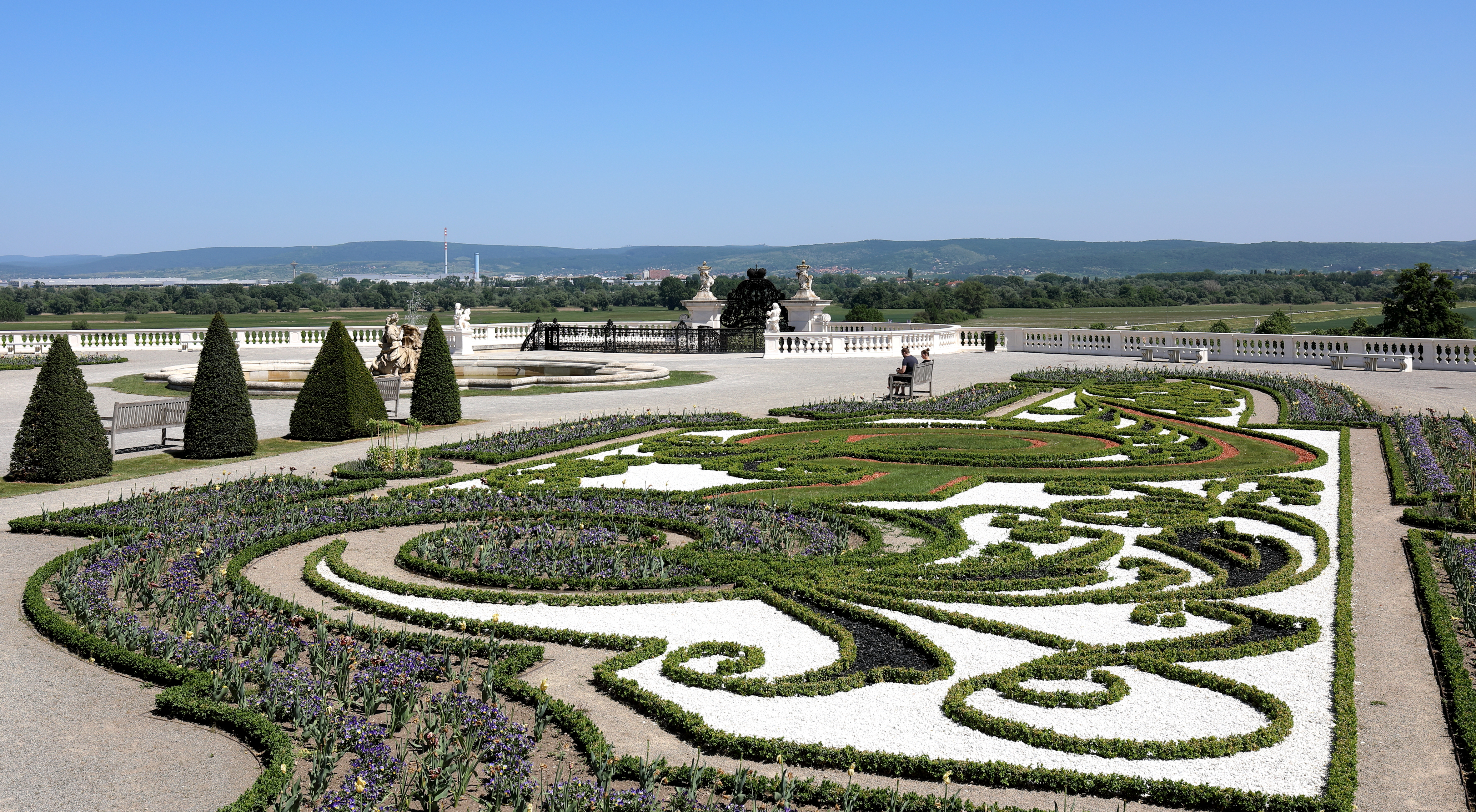 Die 1. Gartenterrasse ostseitig des Schlossgebäudes der Schlossanlage Schloss Hof in der niederösterreichischen Marktgemeinde Engelhartstetten. Die Schlossanlage wurde um 1627 auf einer Geländekante und östlich der mittelalterlichen Feste Hof errichtet. Nachdem 1725 Prinz Eugen die Anlage erworben hatte, baute er diese zu einem repräsentativen Landsitz aus. 1755 kam das Schloss in den Besitz von Maria Theresia. Von 1773 bis 1775 erfolgte dann ein Um- und Ausbau zum heutigen Erscheinungsbild durch Franz Anton Hillebrandt.